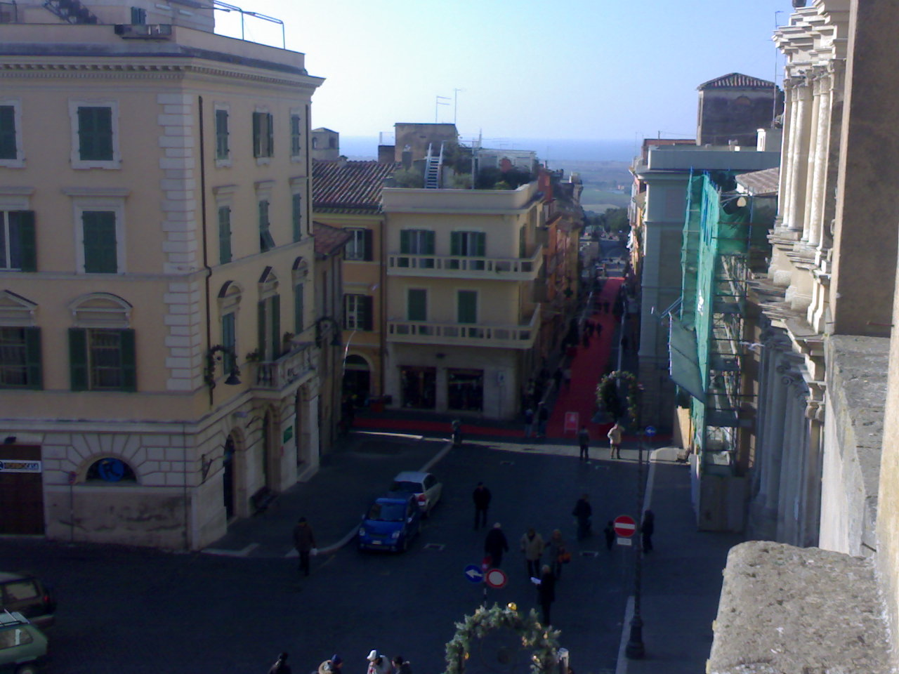 scattata da me